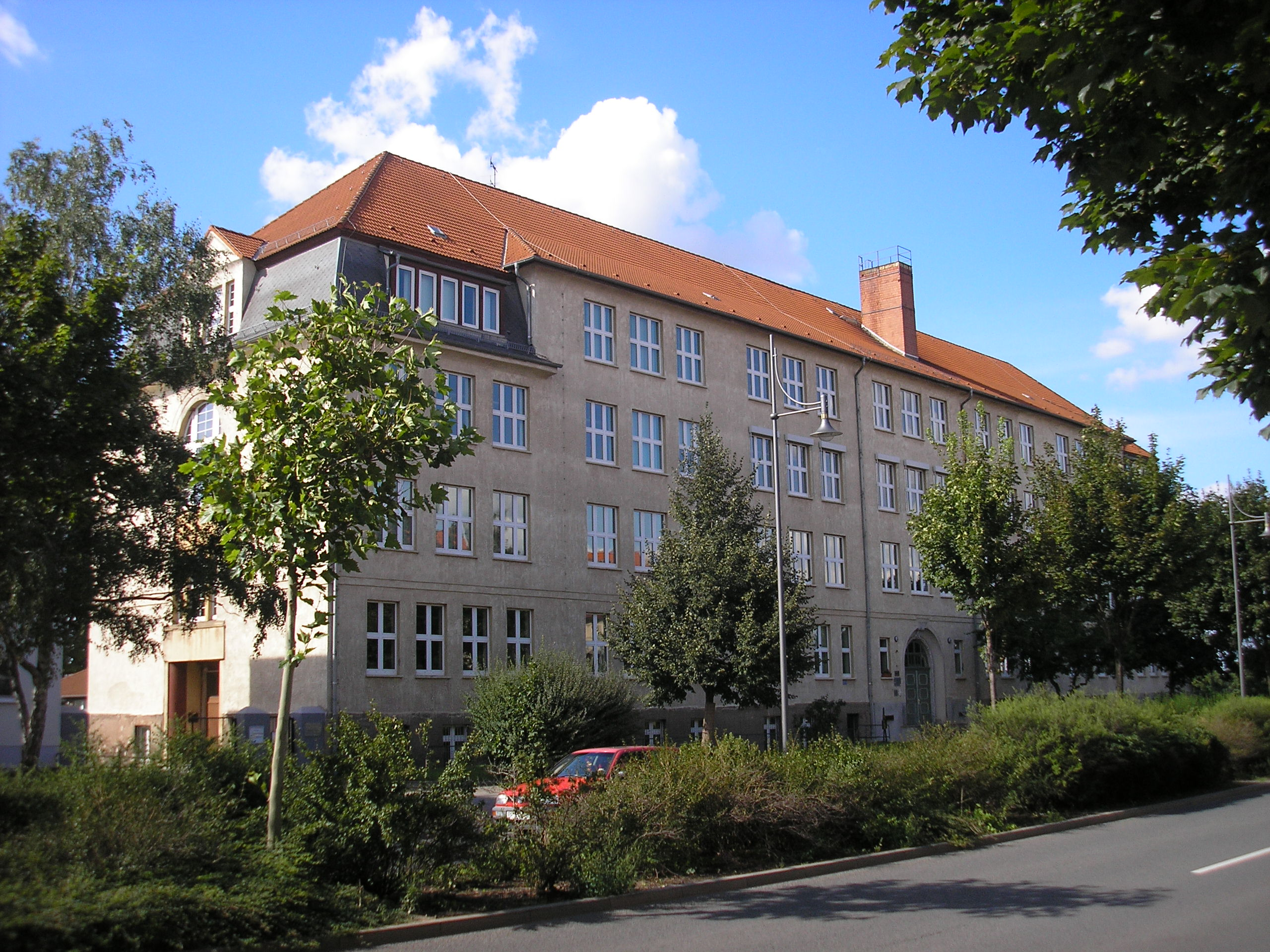 Die Rudolf-Diesel-Schule in Erfurt.